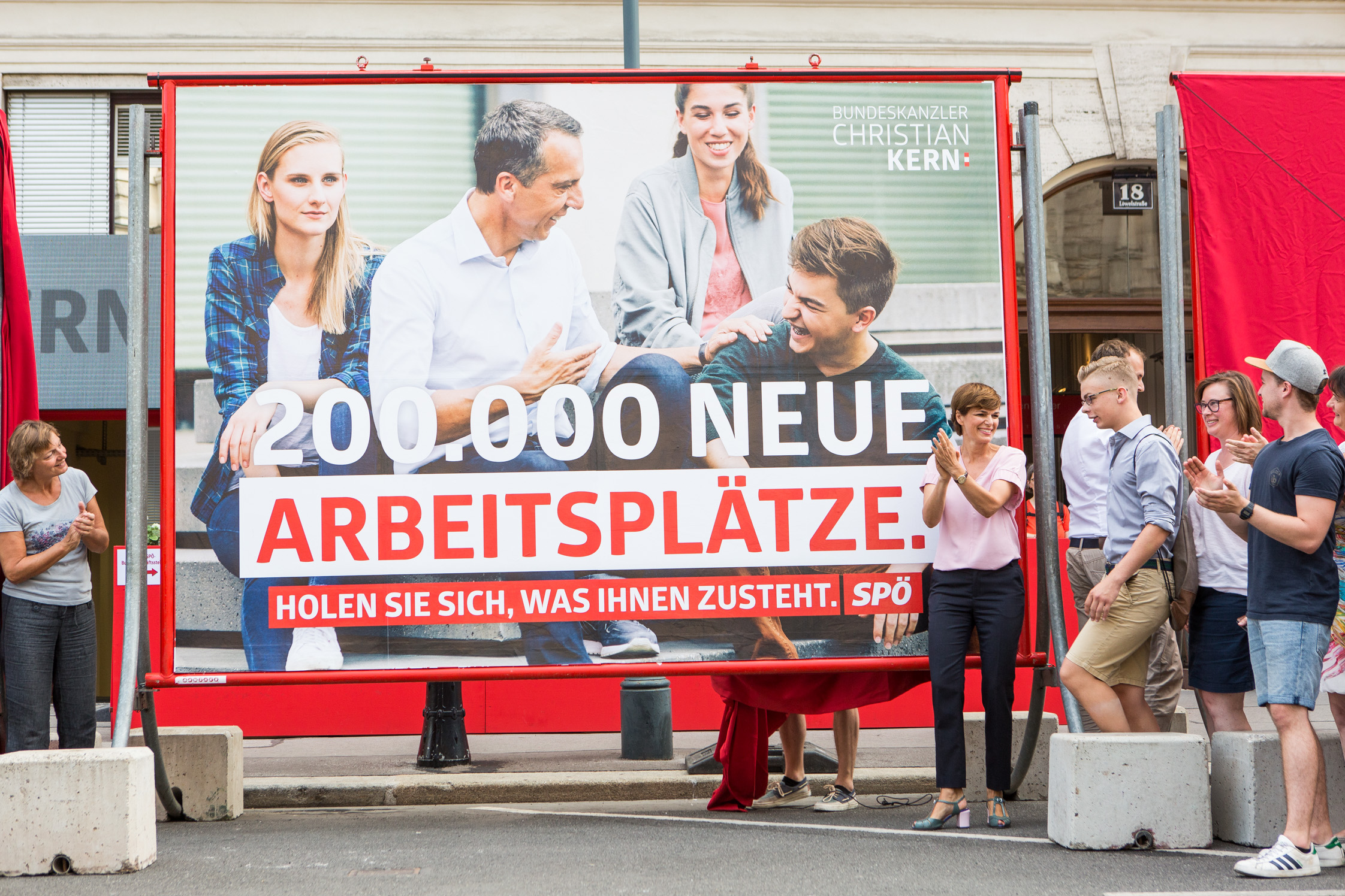 Präsentation Plakatsujets "Holen Sie sich, was Ihnen zusteht". Bild zeigt Pamela Rendi-Wagner.